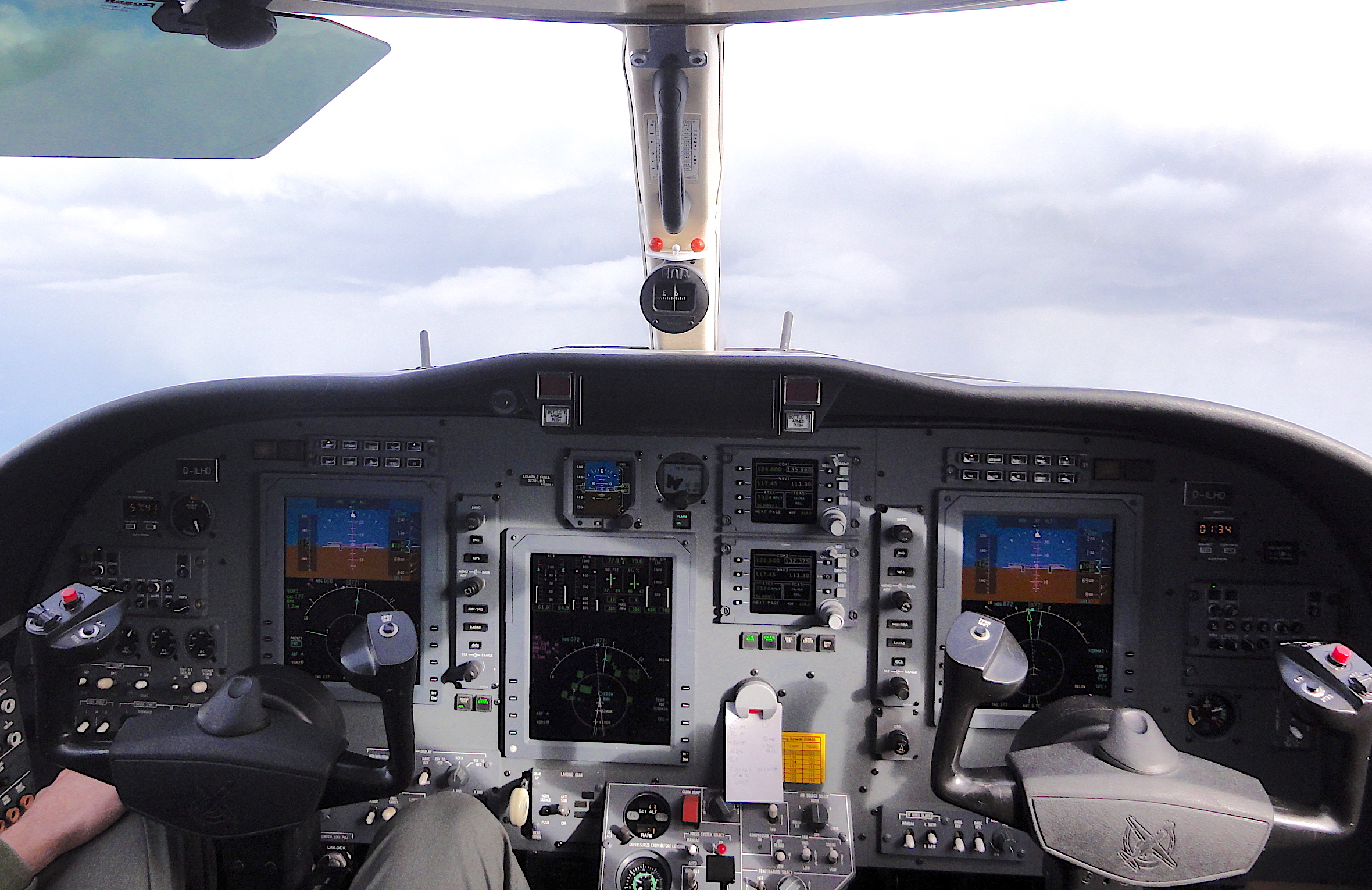 IFR-Flug